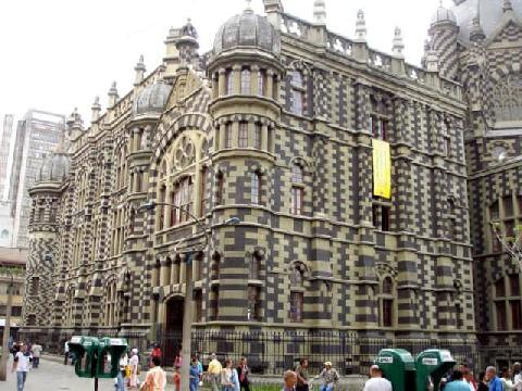 Palacio de la Cultura Rafael Uribe Uribe, Medellín, Colombia